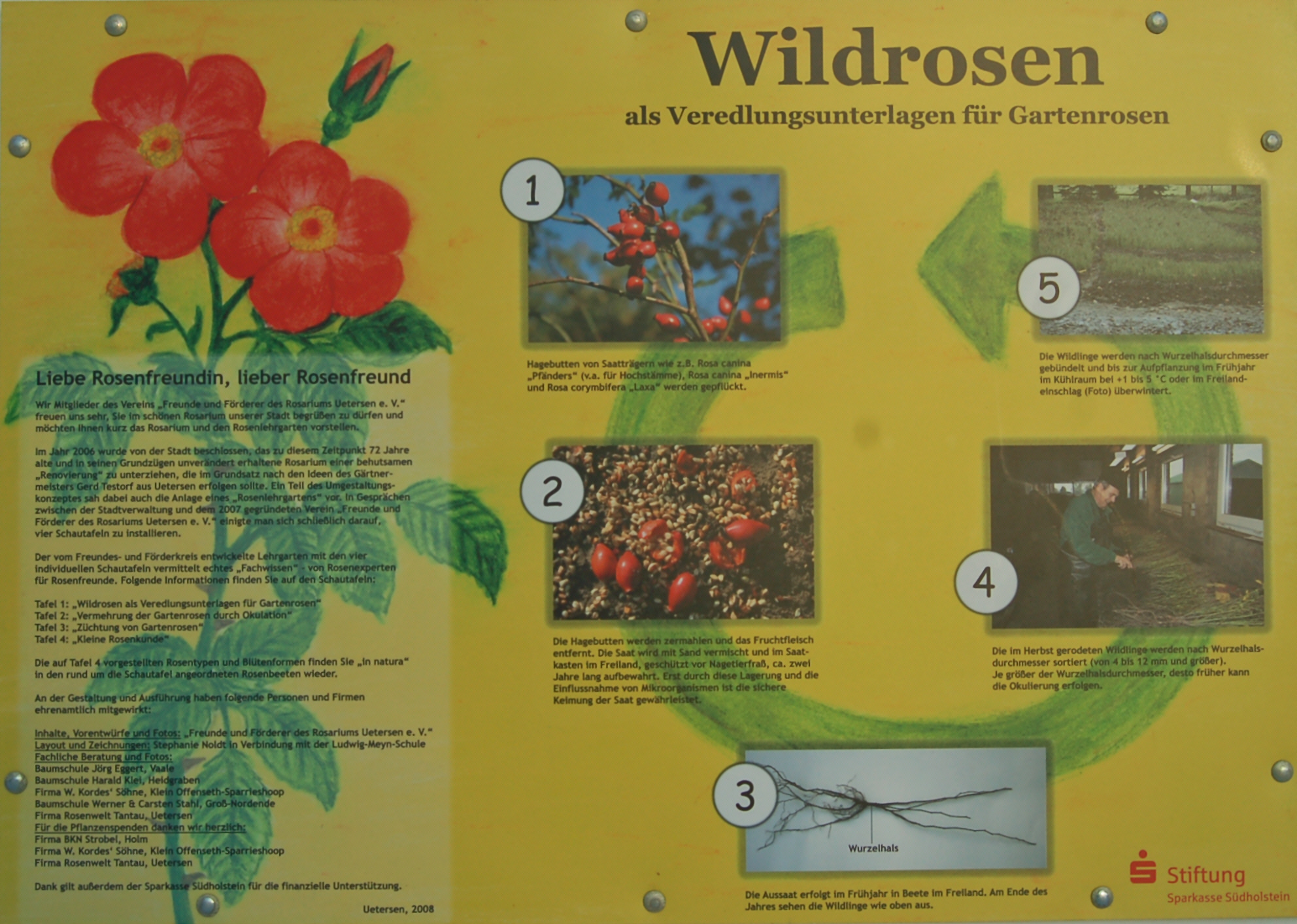 Infoschild Wildrosen als Veredelungsunterlagen für Gartenrosen im Rosarium Uetersen